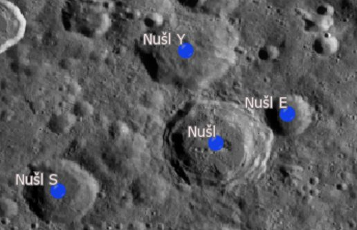 Cráter lunar Nušl. Cráteres satélite. (Imagen LRO)